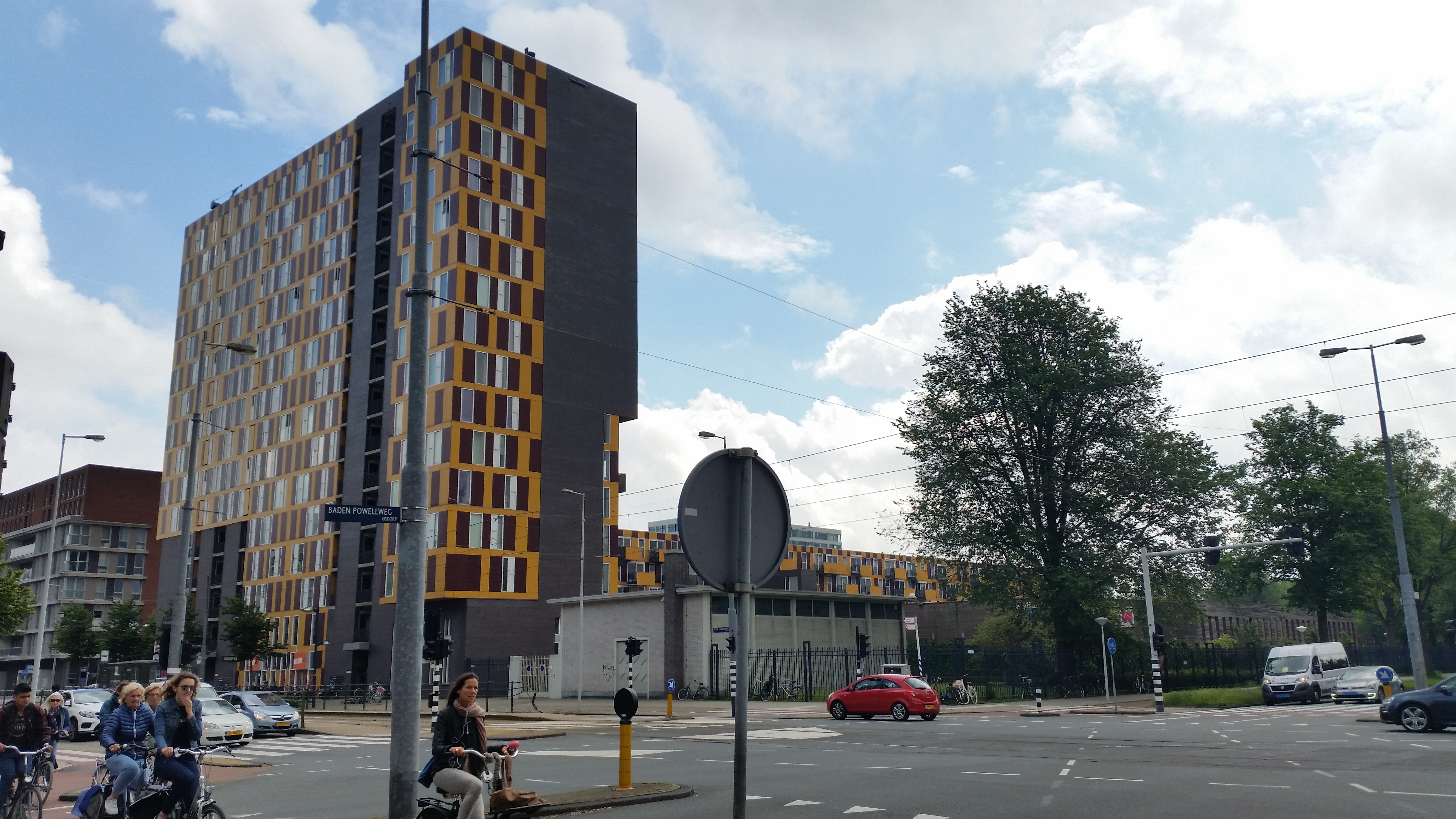 Calandtoren (vlaflip), Pieter Calandlaan, Amsterdam Nieuw-West